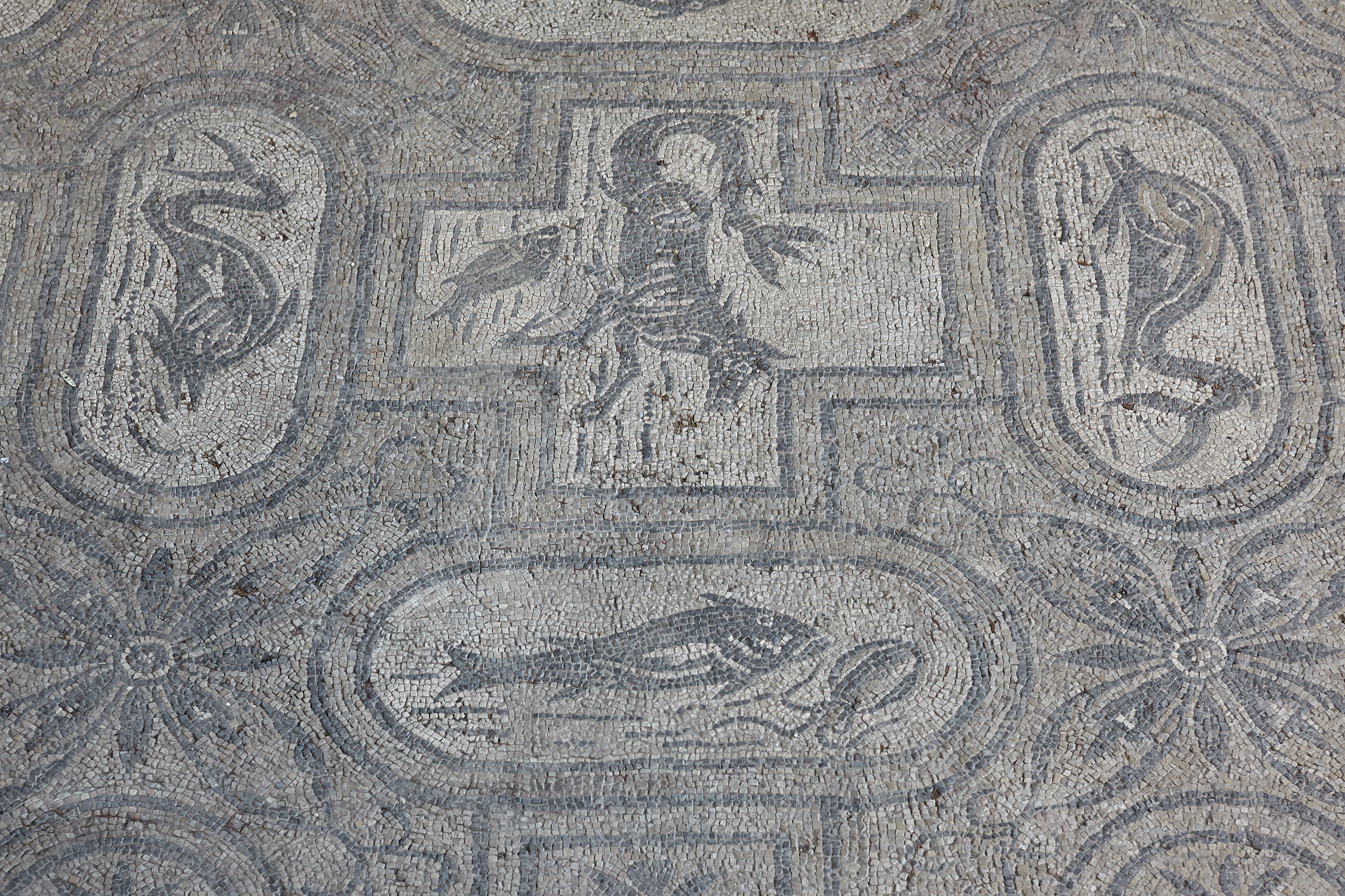 Terme di Vasto This is a photo of a monument which is part of cultural heritage of Italy.